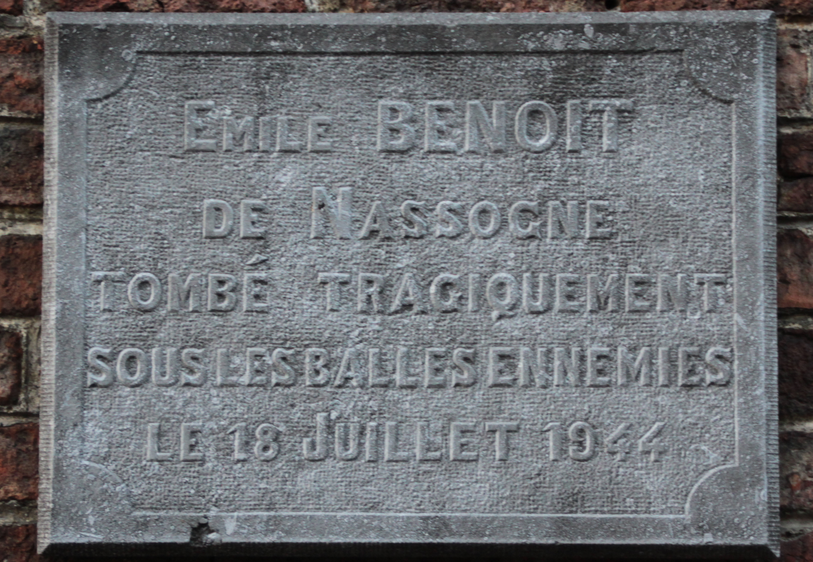 Erënnerungsplack fir den Emile Benoit zu Marche an de Remparts des Jésuites